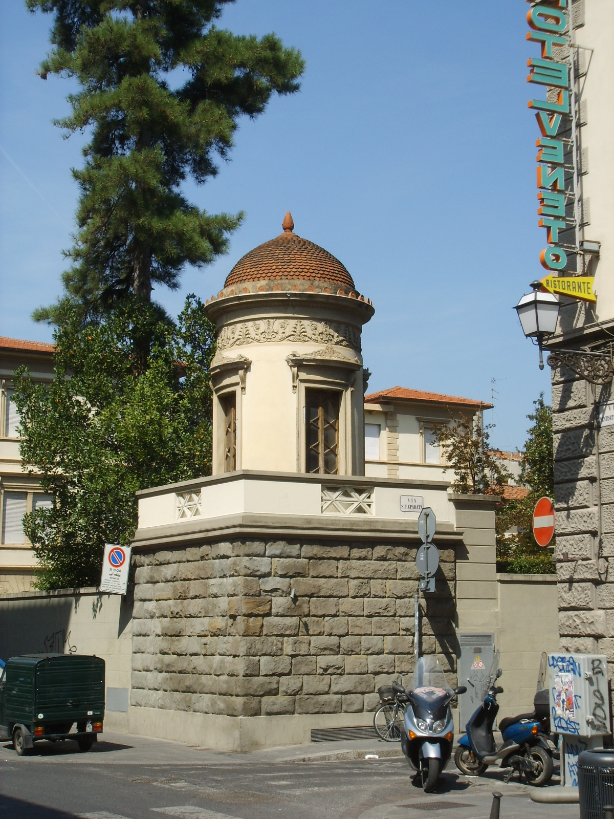 Via xxvii aprile, firenze, edicola